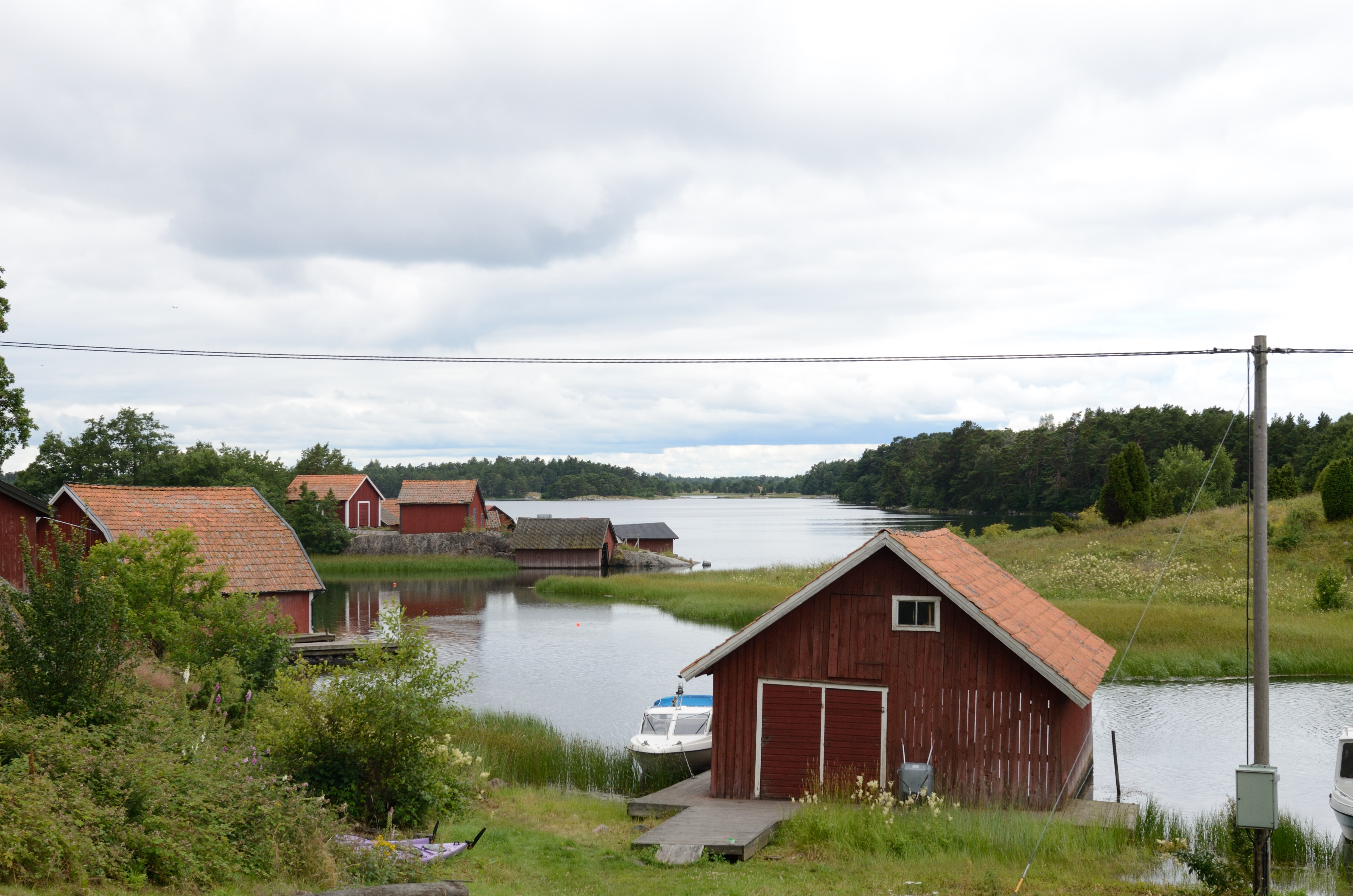 Harstena, Östergötlands skärgård